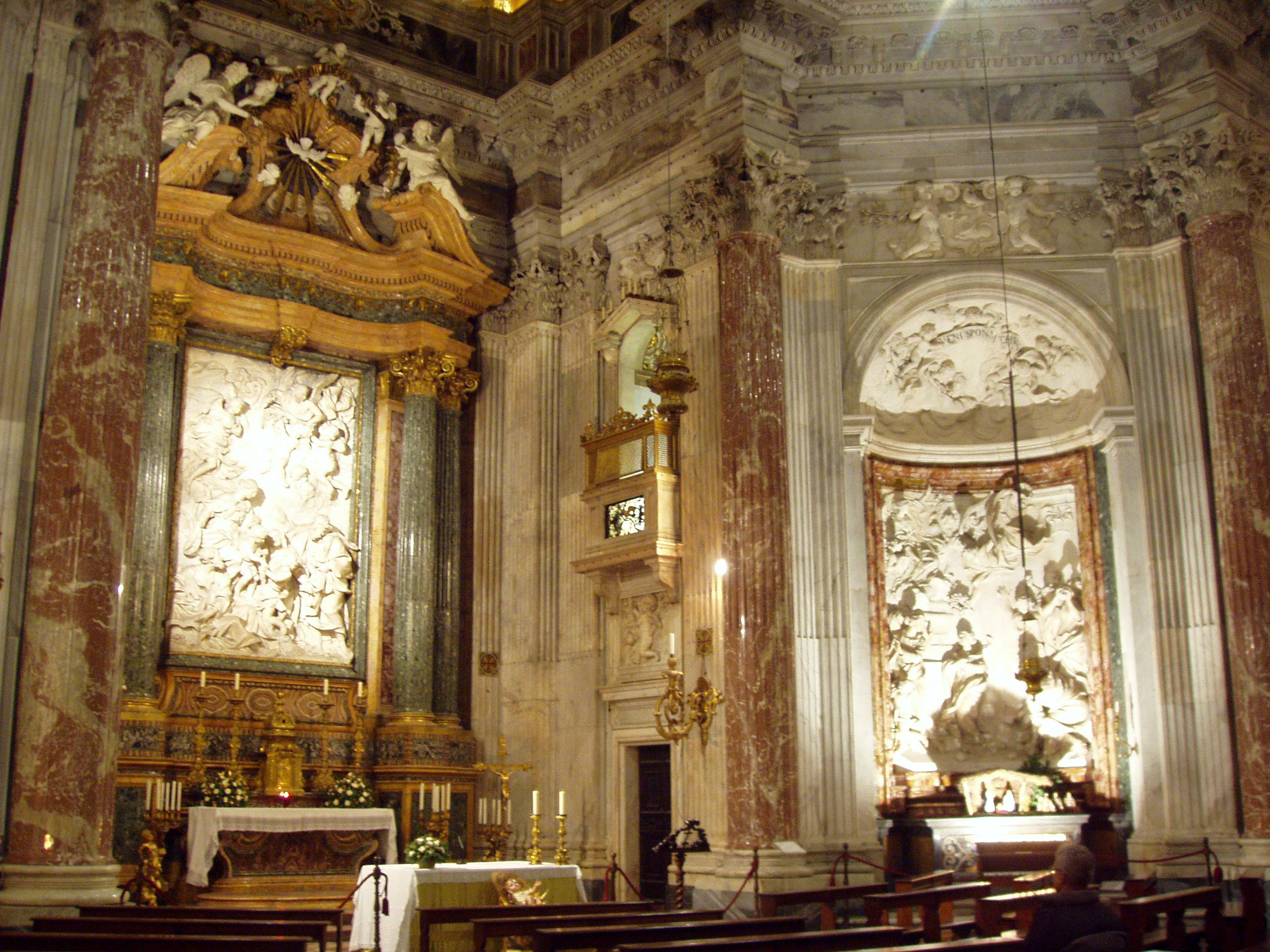 Interno della chiesa di Sant'Agnese in Agone